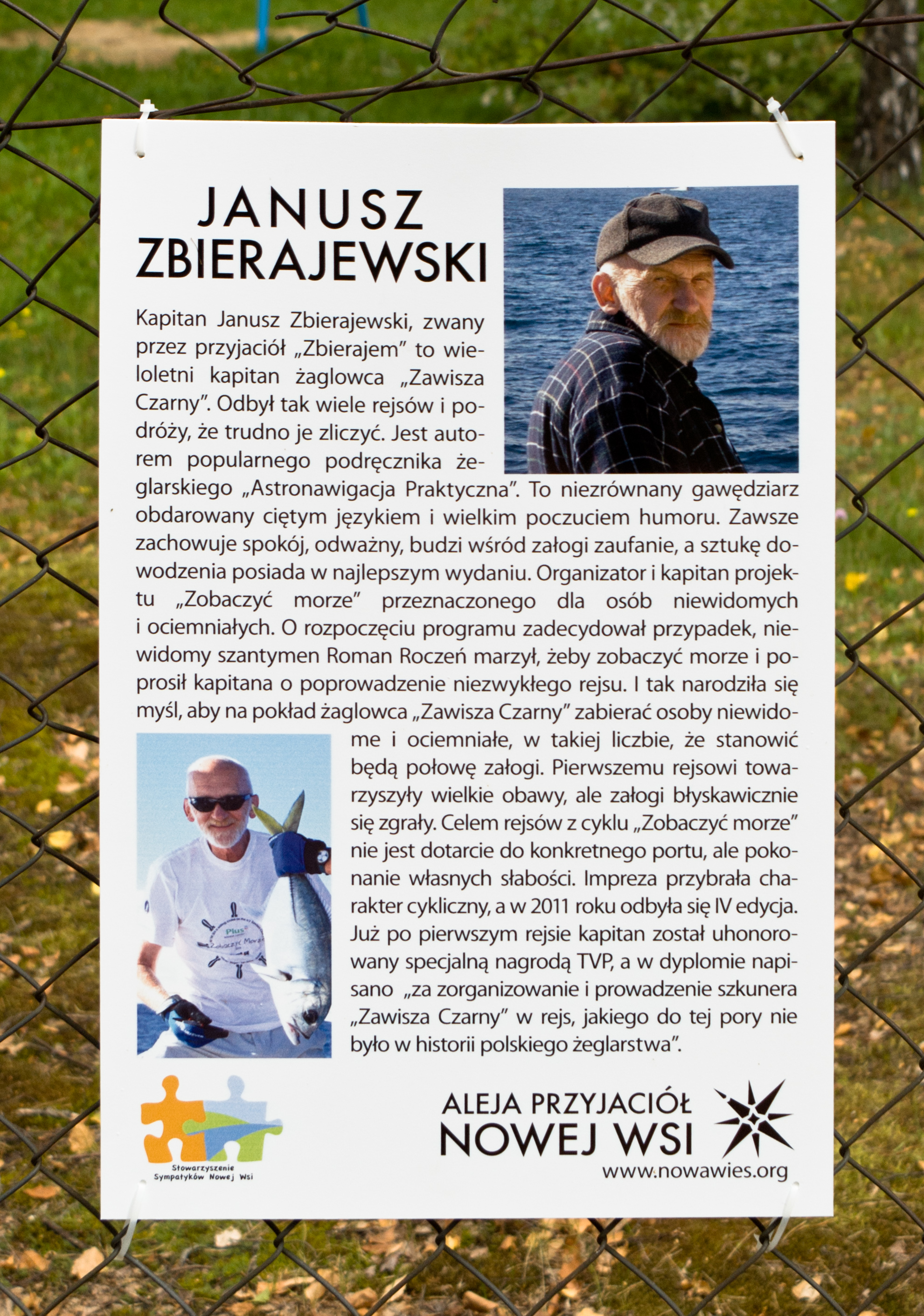 Tablica opisująca Janusza Zbierajweskiego w Alei Przyjaciół Nowej Wsi (powiat legionowski).